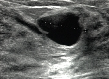 Zyste in der Mammasonographie